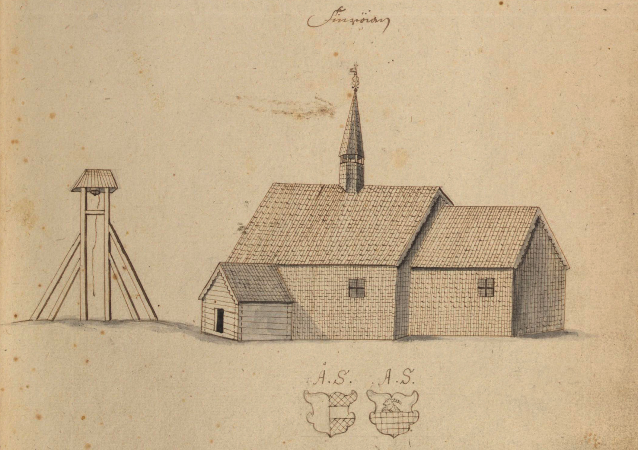 Kyrka, äldre, teckning ur Peringskiölds Monumenta, avfotograferad i färg. Kategori: (01) ExteriörerKyrka, äldre, teckning ur Peringskiölds Monumenta, avfotograferad i färg.